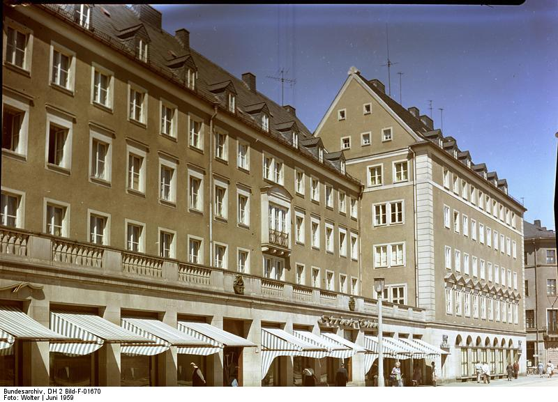 Karl-Marx-Stadt, Zentrum Zentrum in Karl-Marx-Stadt (heute:Chemnitz) [Karl-Marx-Stadt.- Zentrum]